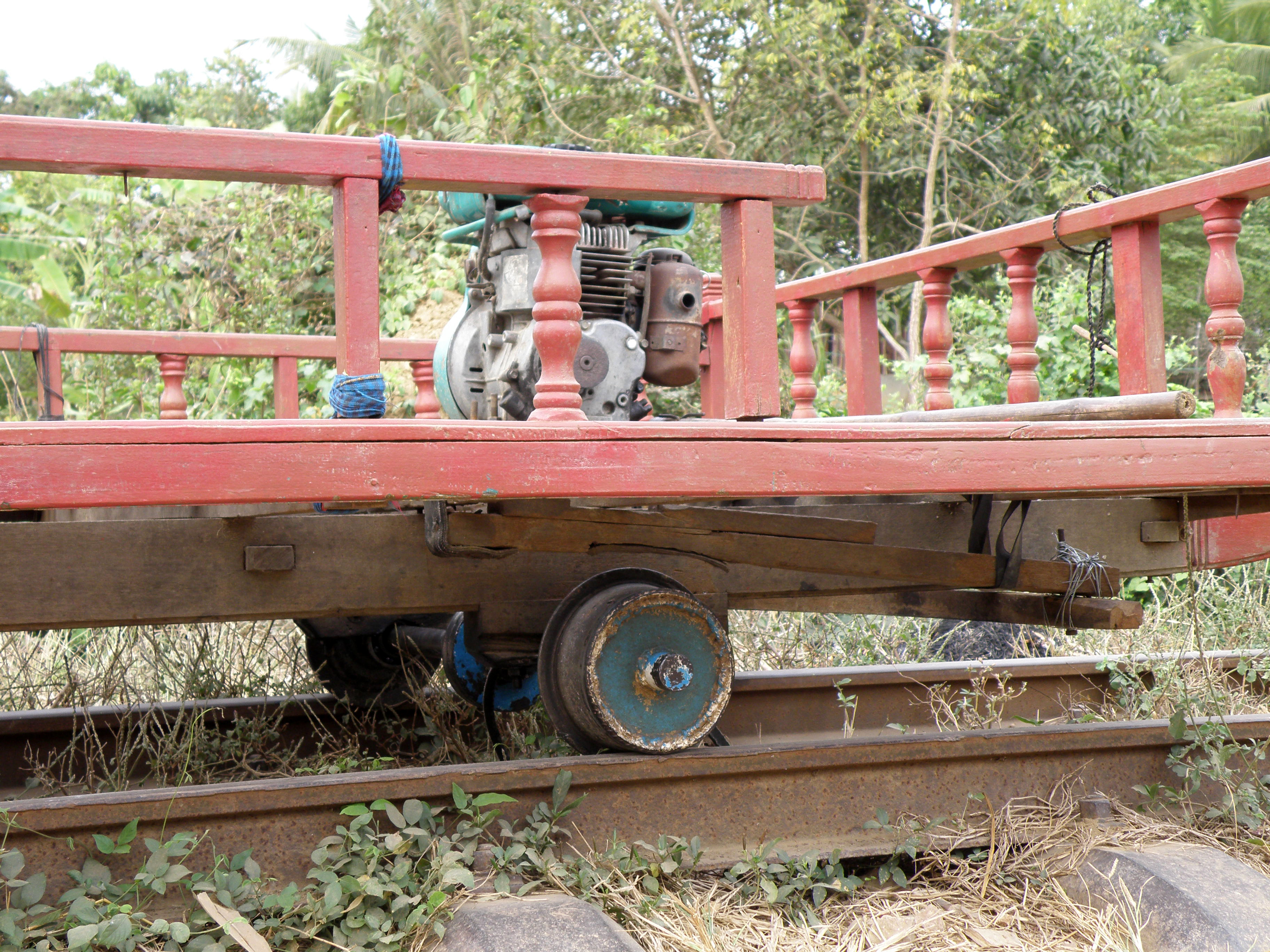 Cambodge - Battambang - Le train de bambou - Essieu